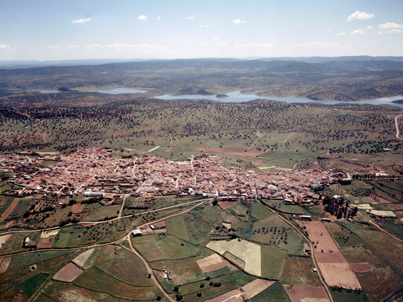 Castilblanco, en Badajoz (España).